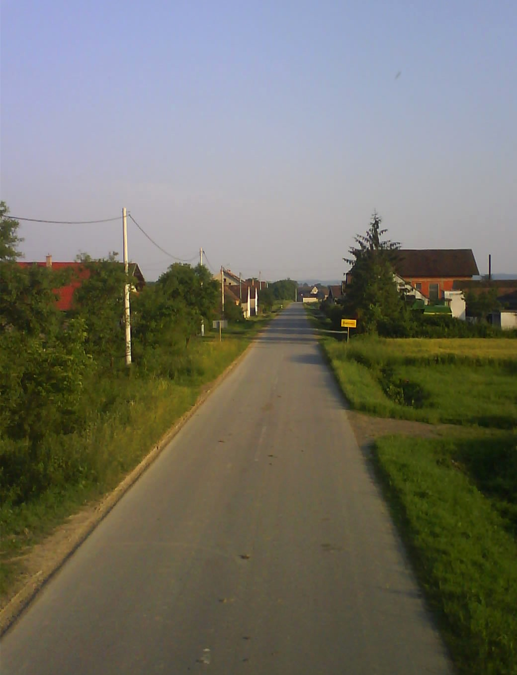 Ulica Sokak u Banovcima kod Slavonskog Broda